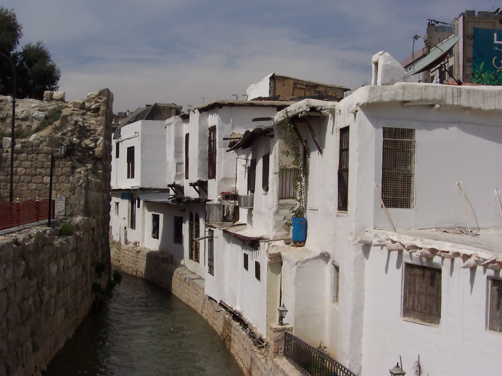 Barada river near Damascus Citadel.